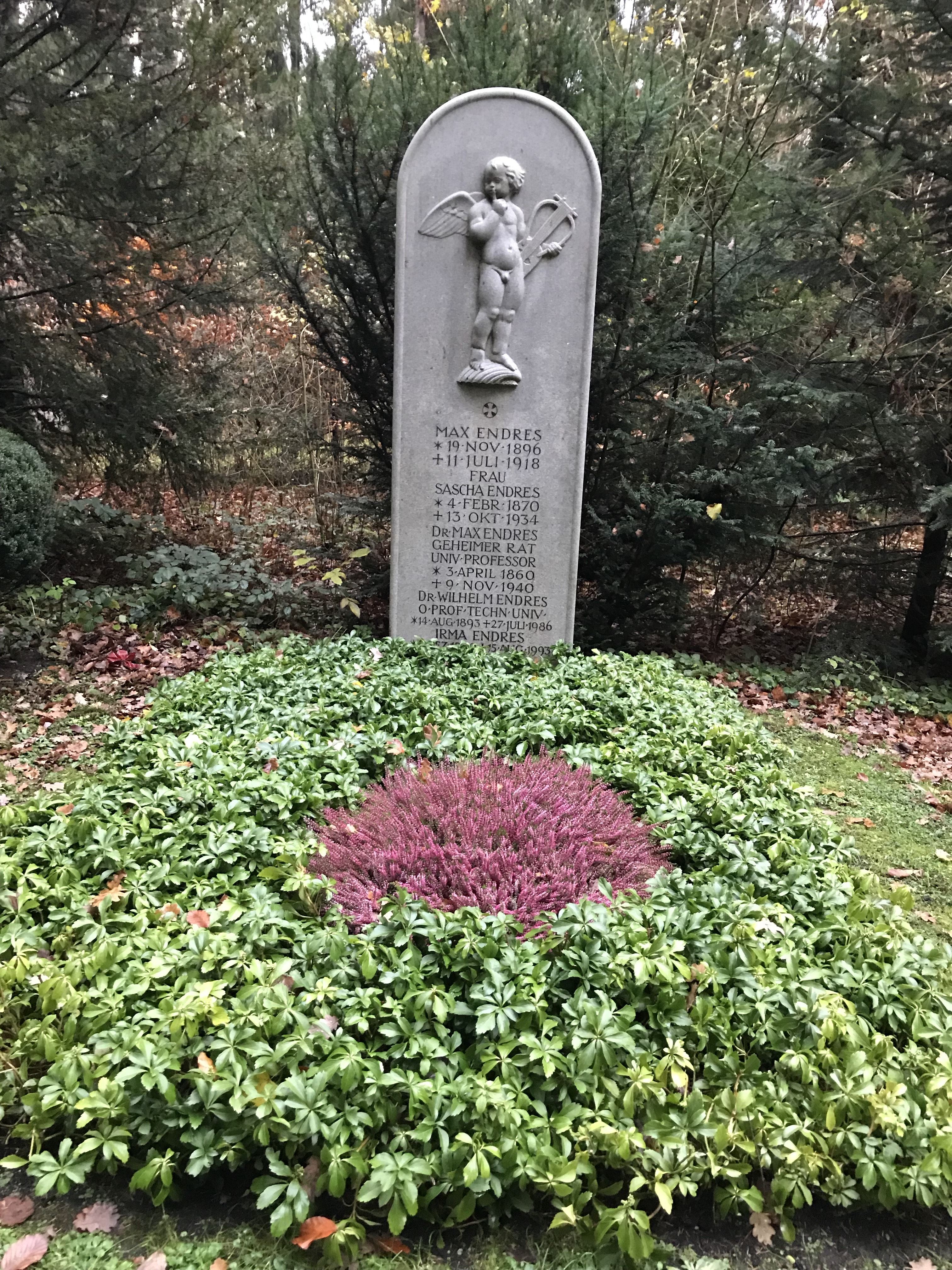 Grabstein von Prof. Max Endres, seiner Frau Alexandra "Sascha" Endres, den gemeinsamen Söhnen Wilhelm und Max, fotografiert am 13.11.2017 im Waldfriedhof München